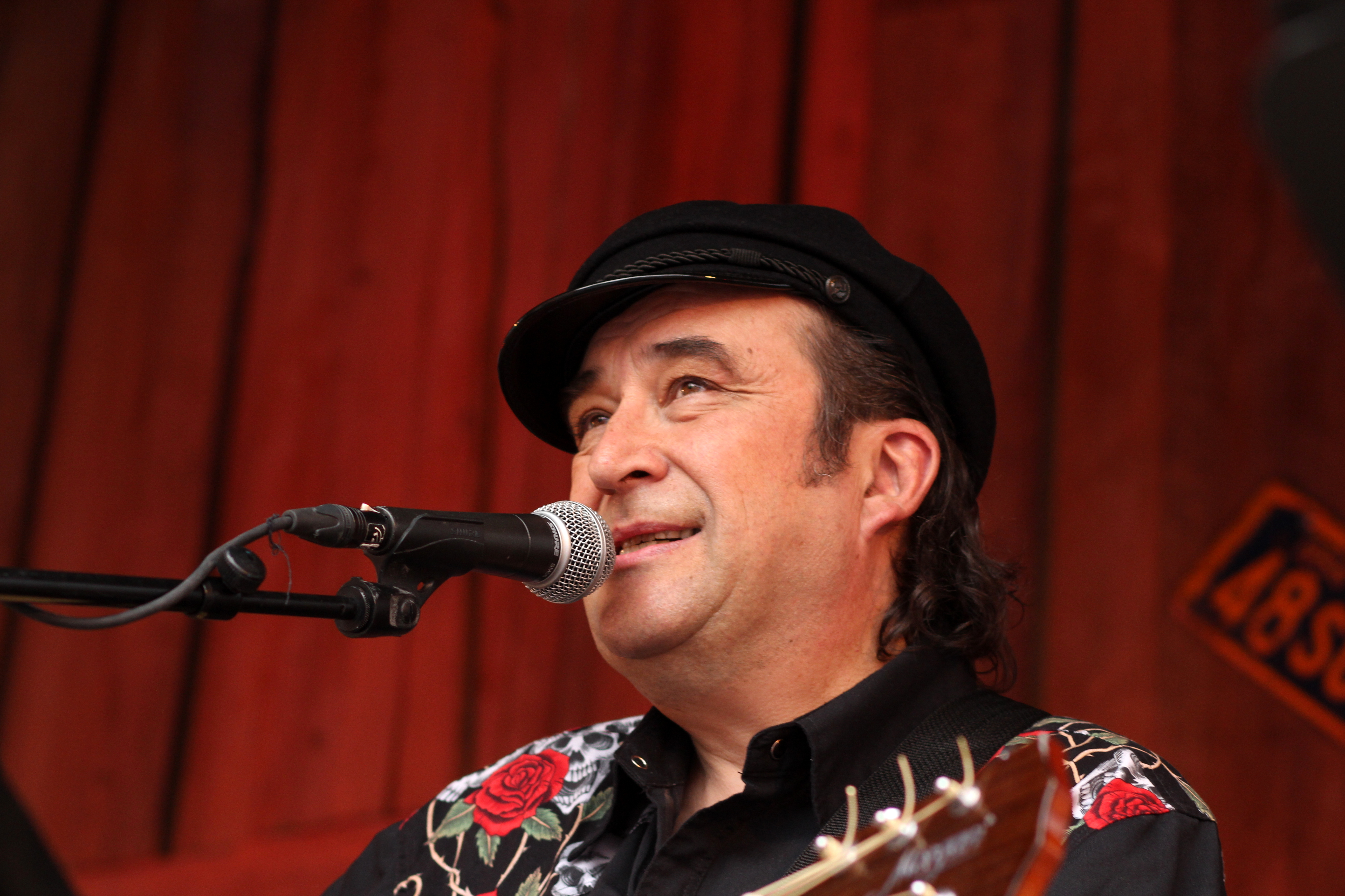 Steinar Albrigtsen på Notodden Blues Festival